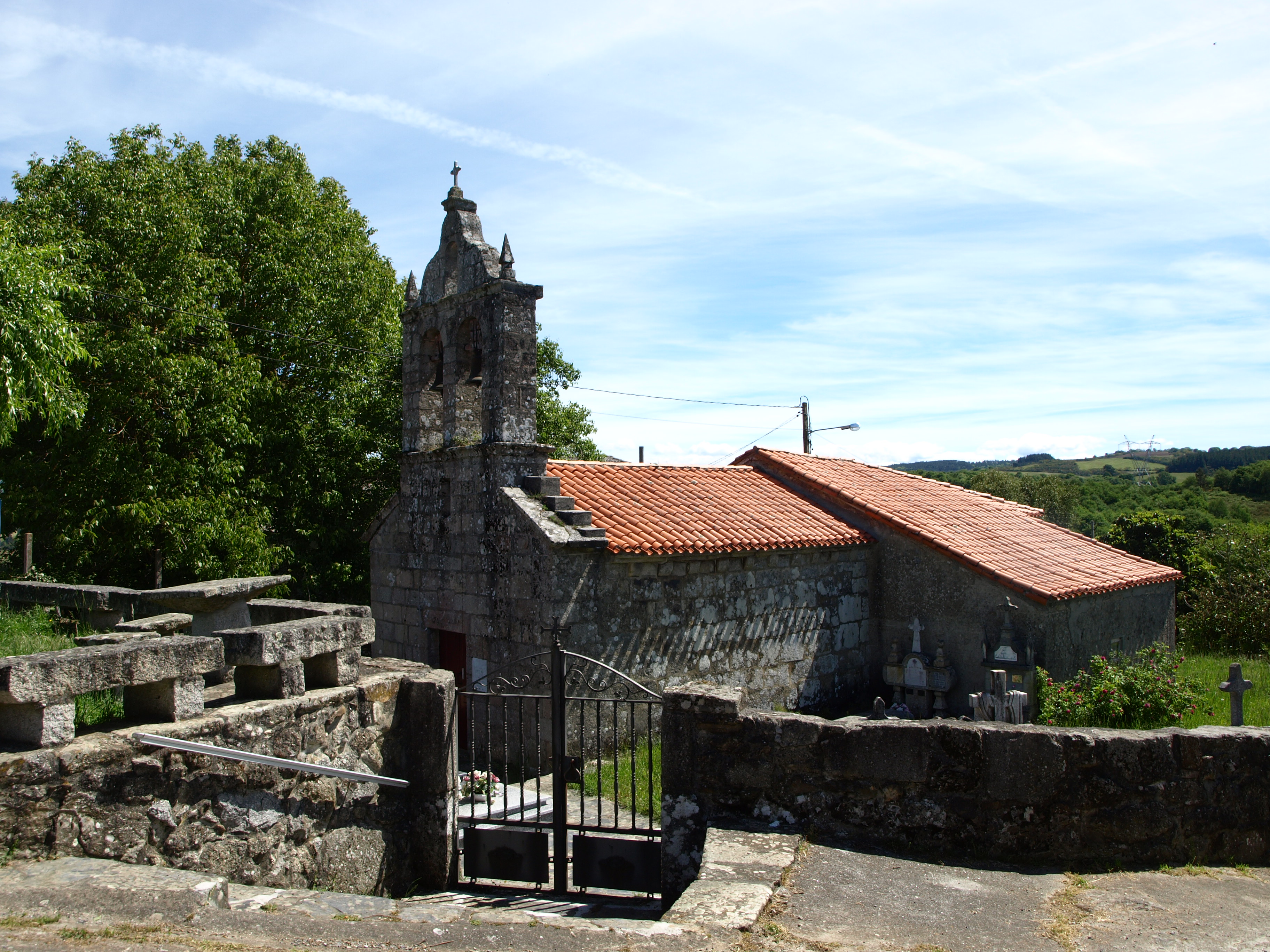 Igrexa parroquial de Santiago de Xuvencos (O Saviñao)